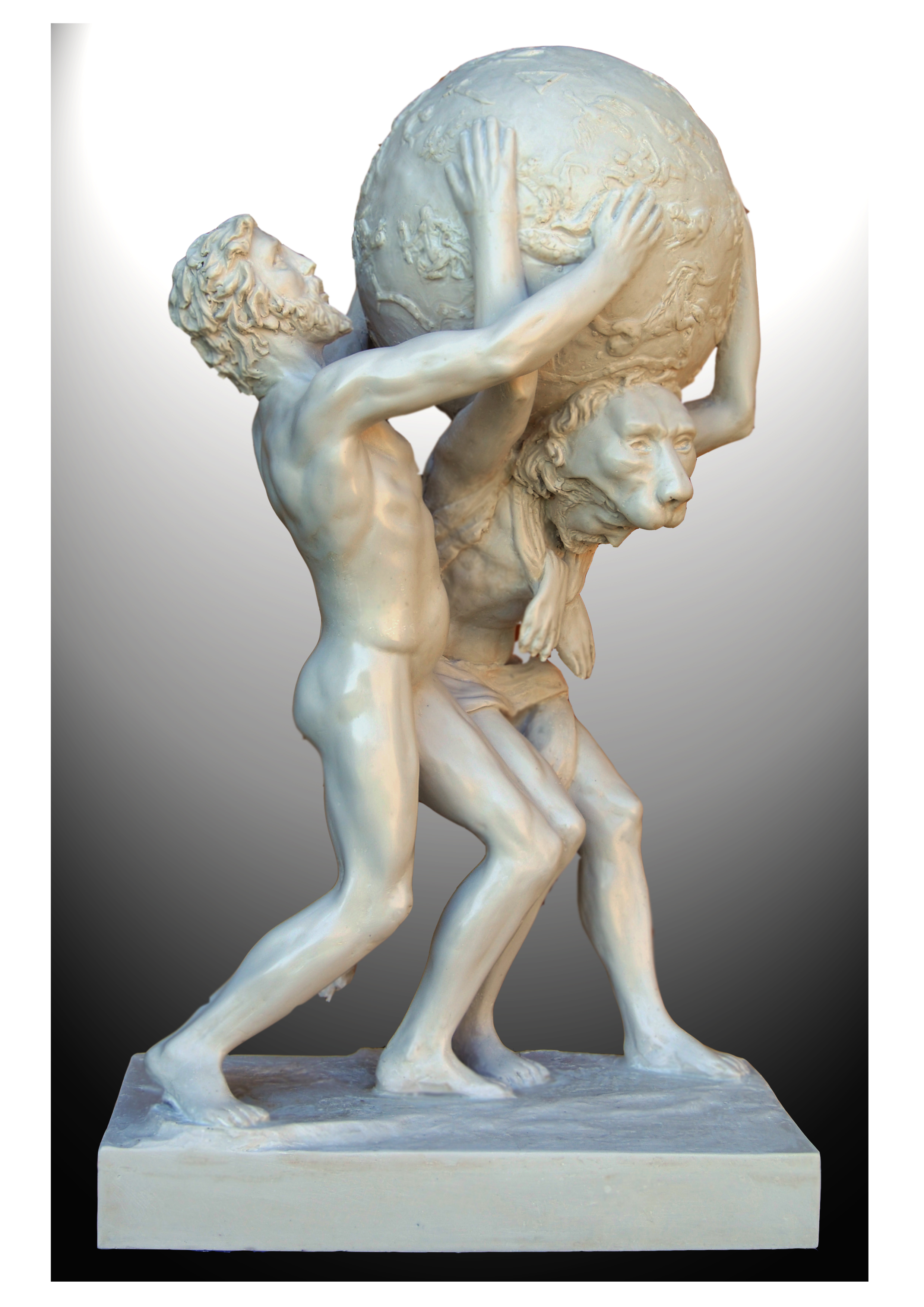 Estatuilla de 93 por 54 y por 36 cm, realizada en mármol artificial. Obra de J. M. Félix Magdalena, pertenece a la serie de su creación sobre "los trabajos de Heracles". Heracles soporta el cielo para que Atlas le traiga las doradas manzanas de las Hespérides.